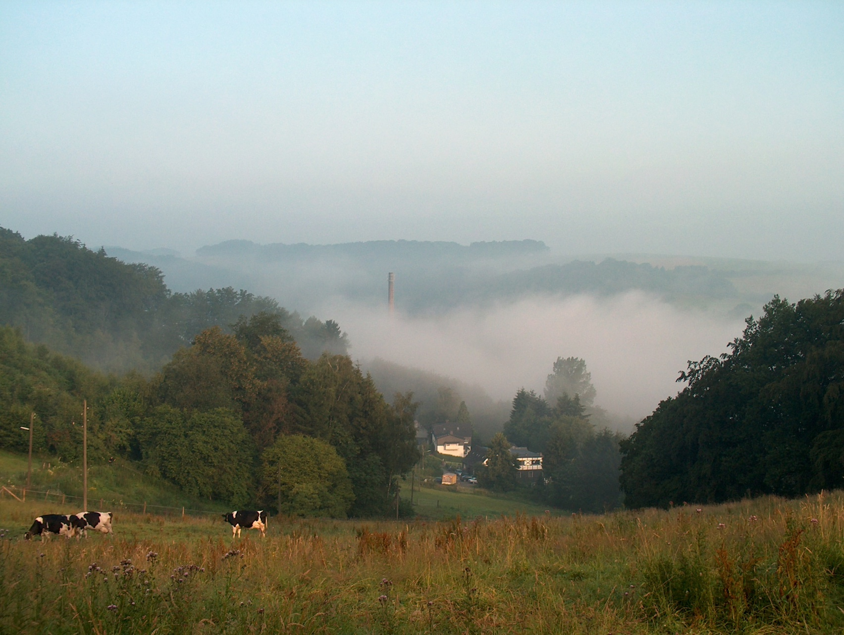 Radevormwald, Blick von Herkingrade ins Wuppertal Datum: 22.7.2004 Autor: Christoph Grimlowski